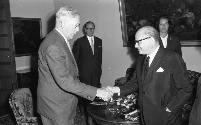 Bundesmin. Dr. [Heinrich] Krone empfängt den Vorsitzenden der Liberalen Partei Kolumbiens Dr. Carlos Lleras Restrepo (rechts) im Haus des Bundeskanzlers